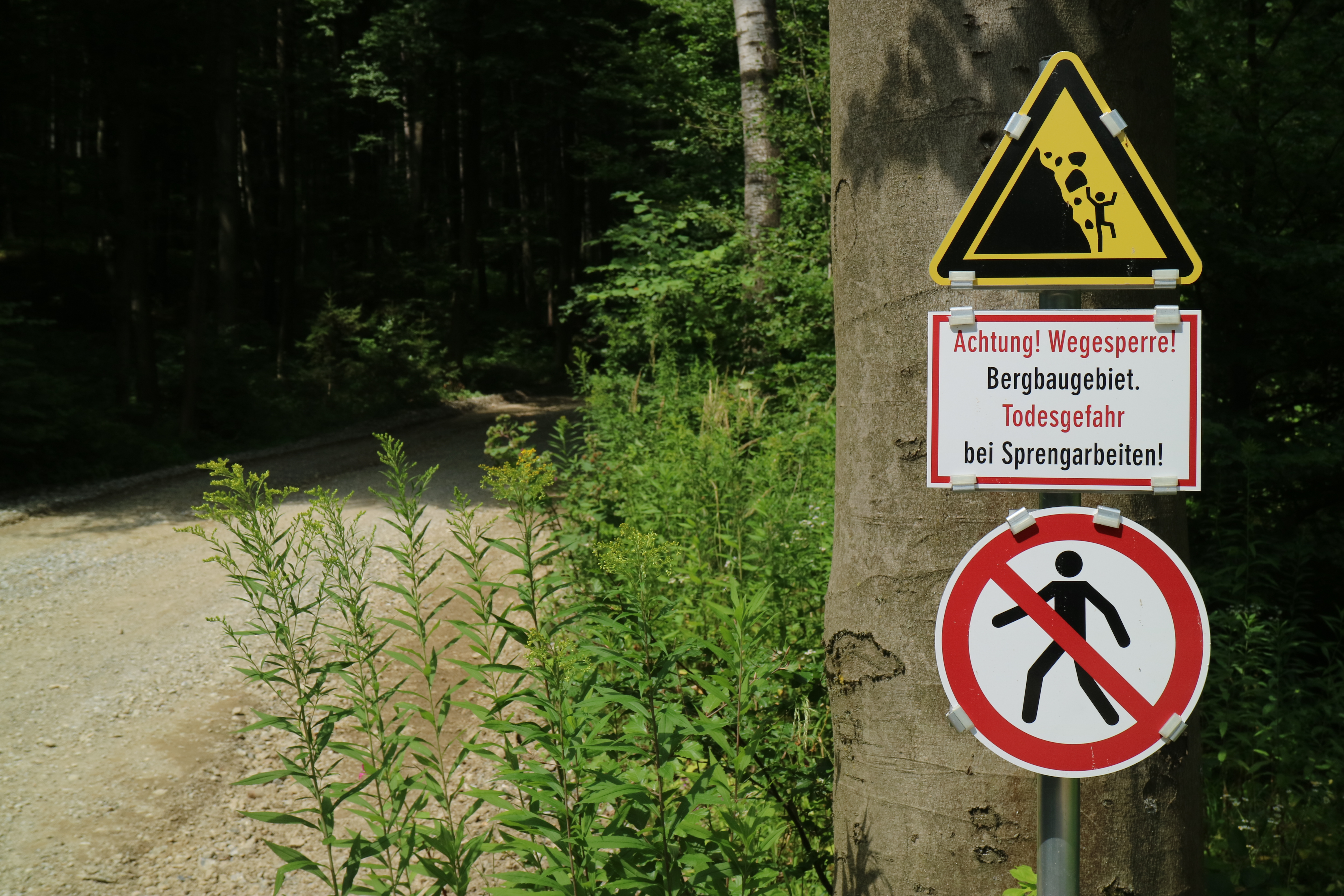 Wegsperre am Kanzelkogel bei Graz, Gemeinde Gratkorn, Steiermark